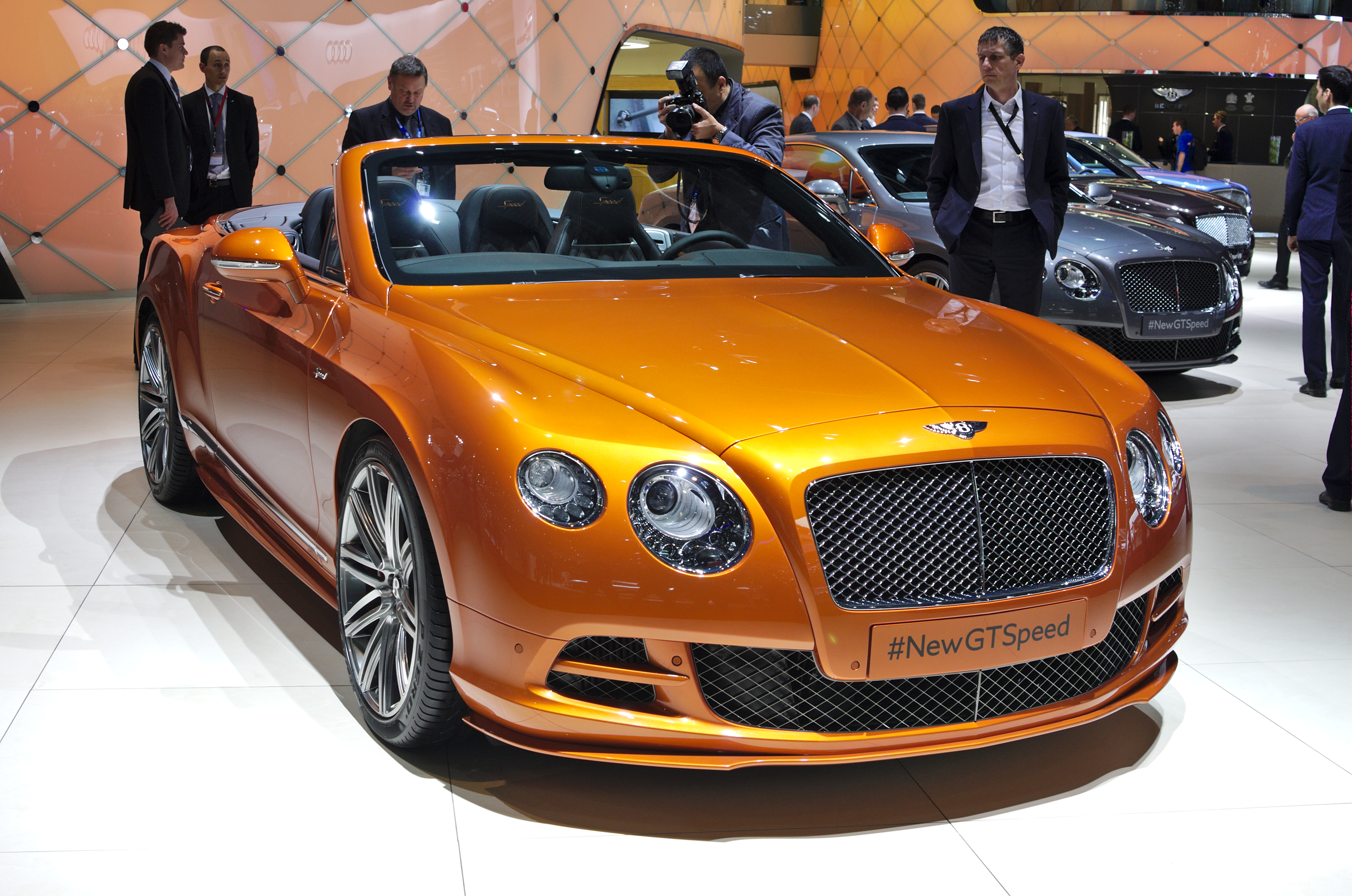 Salon de l'auto de Genève 2014 - 20140305 - Bentley NewGTSpeed